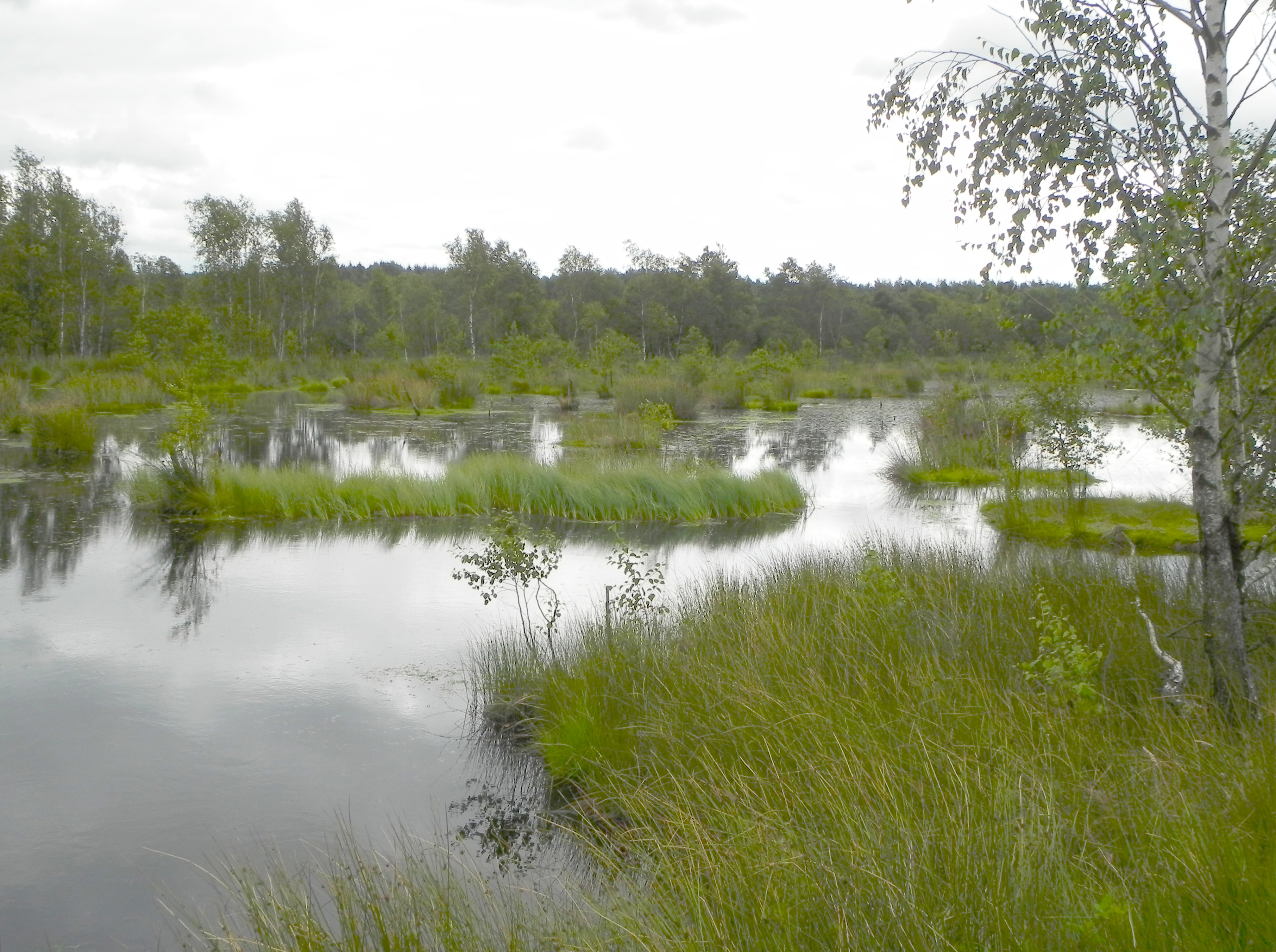 Quellgebiet der Böhme im Pietzmoor, Lüneburger Heide, Germany